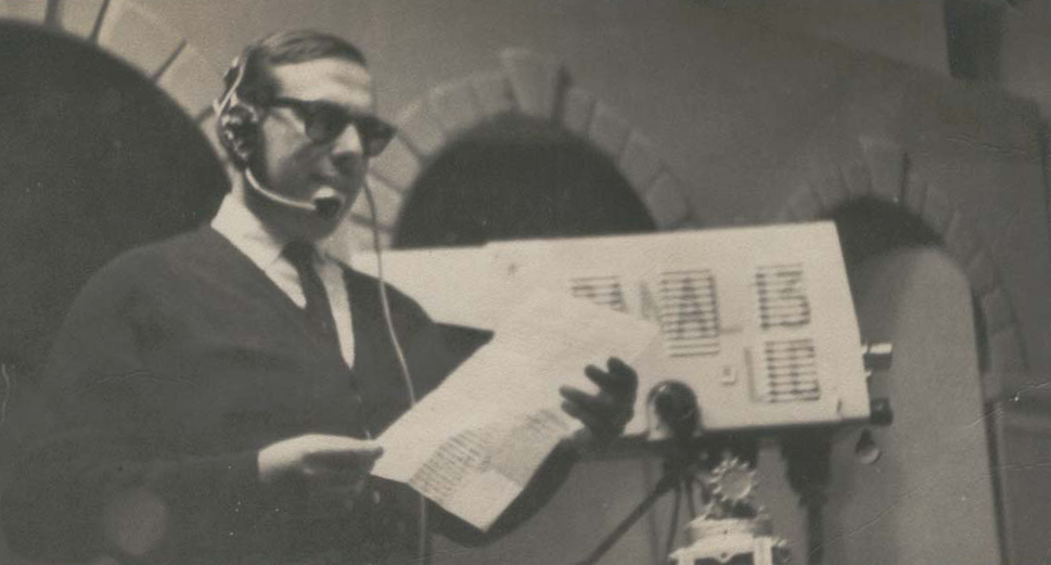 Foto de David Raisman en el estudio A de Canal 13 de la Pontificia Universidad Católica de Chile